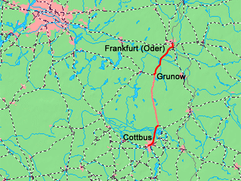 Karte der Bahnstrecke Cottbus–Frankfurt (Oder)